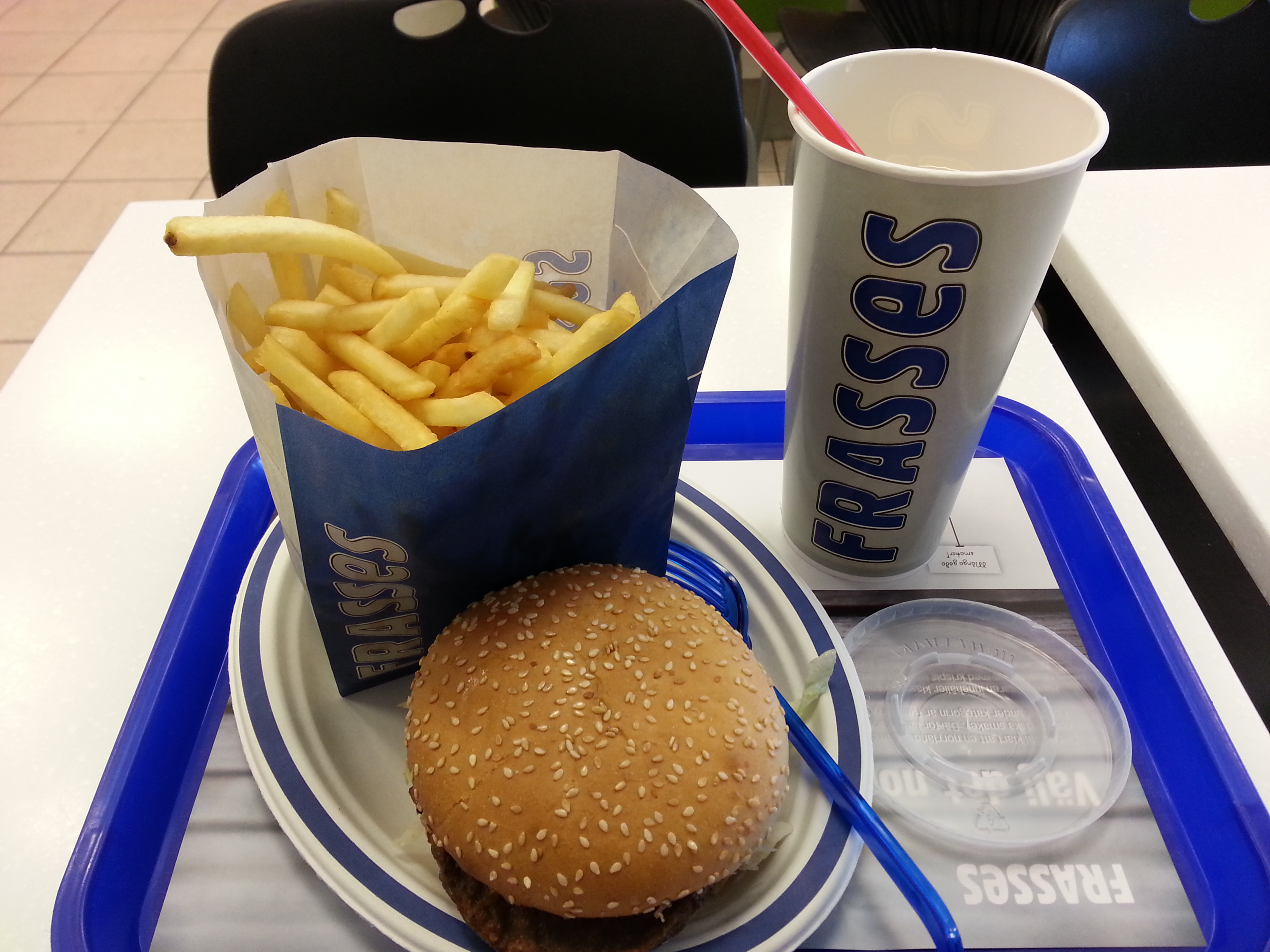 De har stora portioner i norr...